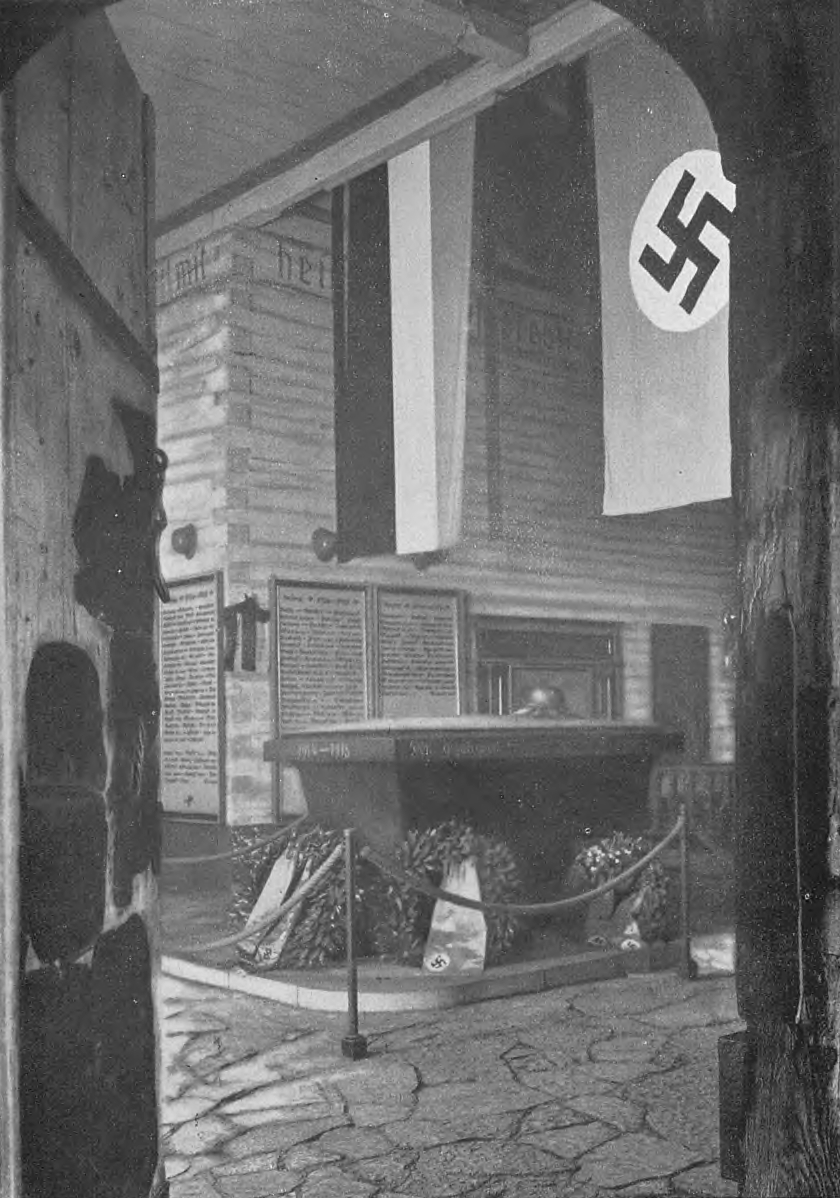 Wnętrze kościoła św. Wawrzyńca w Bytomiu, przekształcone w mauzoleum-pomnik poległych mieszkańców Bytomia w czasie I wojny światowej.